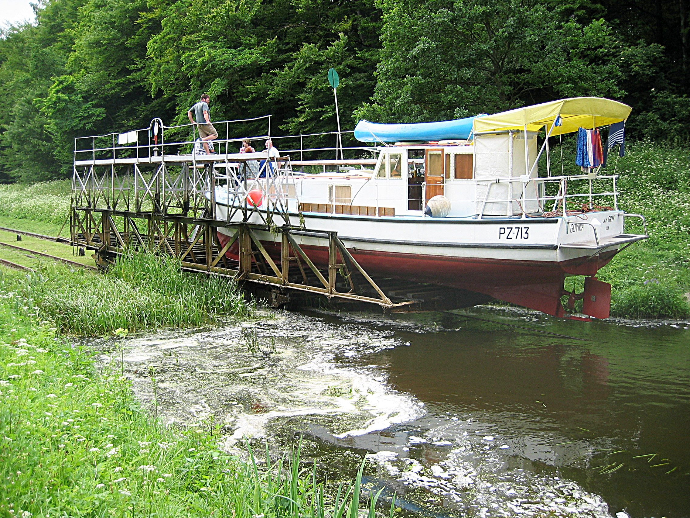 Rollwagen mit Boot auf der Geneigten Ebene selbst fotografiert